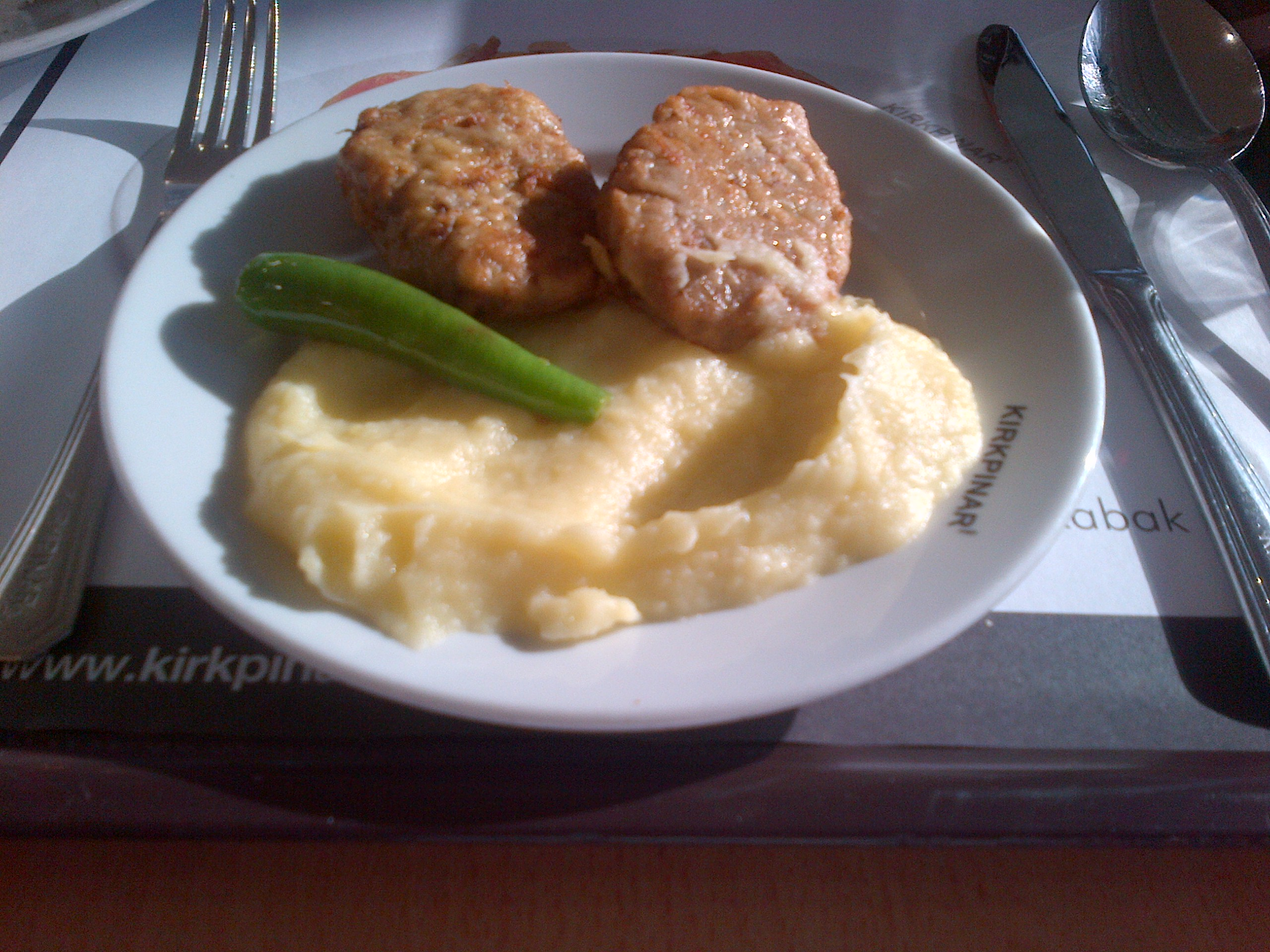 "Kadınbudu köfte" es un plato de la cocina turca hecho con carne y arroz como principales ingredientes.